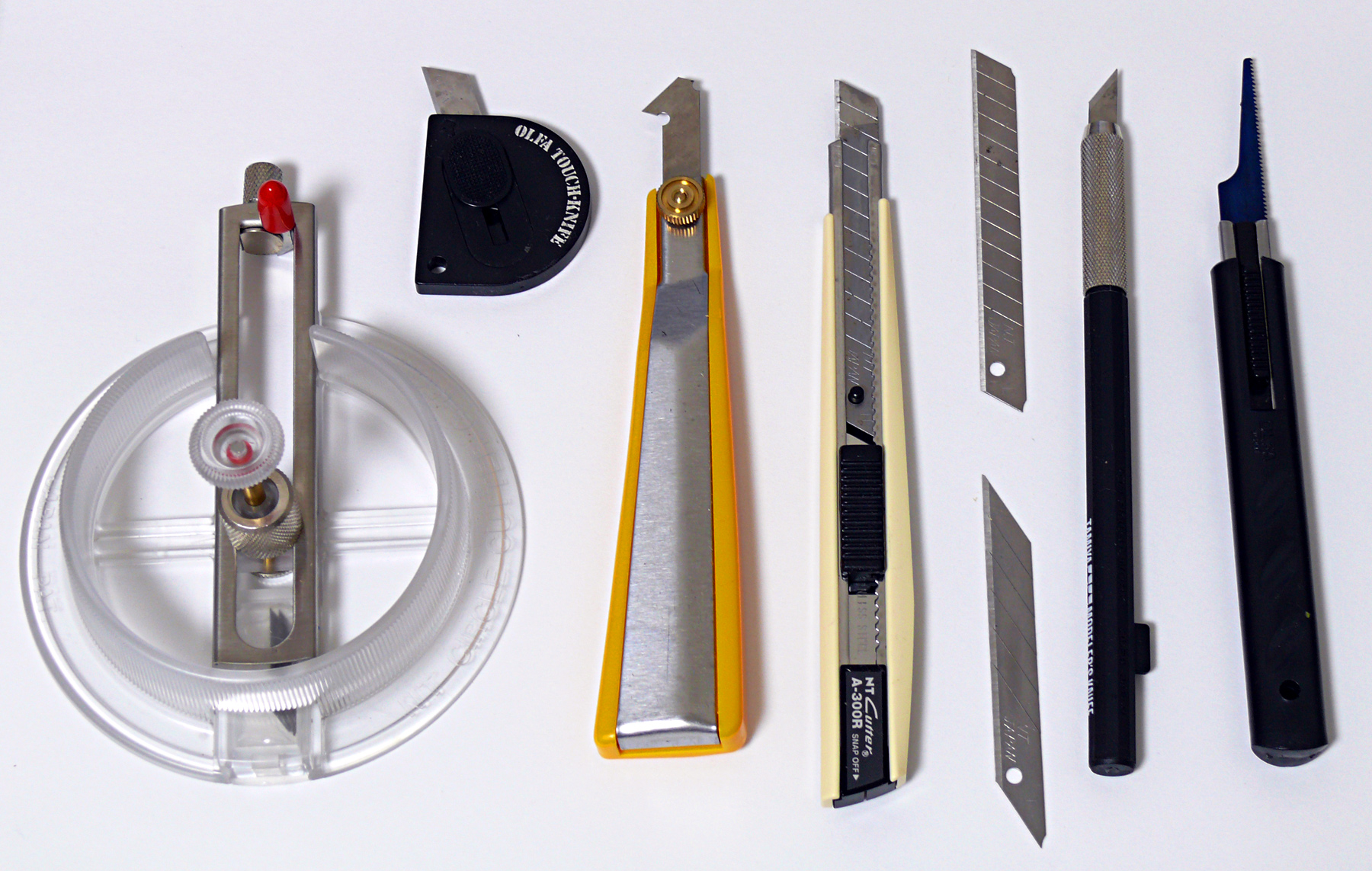 さまざまなカッターナイフ (円切り/タッチナイフ/アクリルカッター/一般的なカッター/60°刃/30°刃/デザインナイフ/鋸カッター)